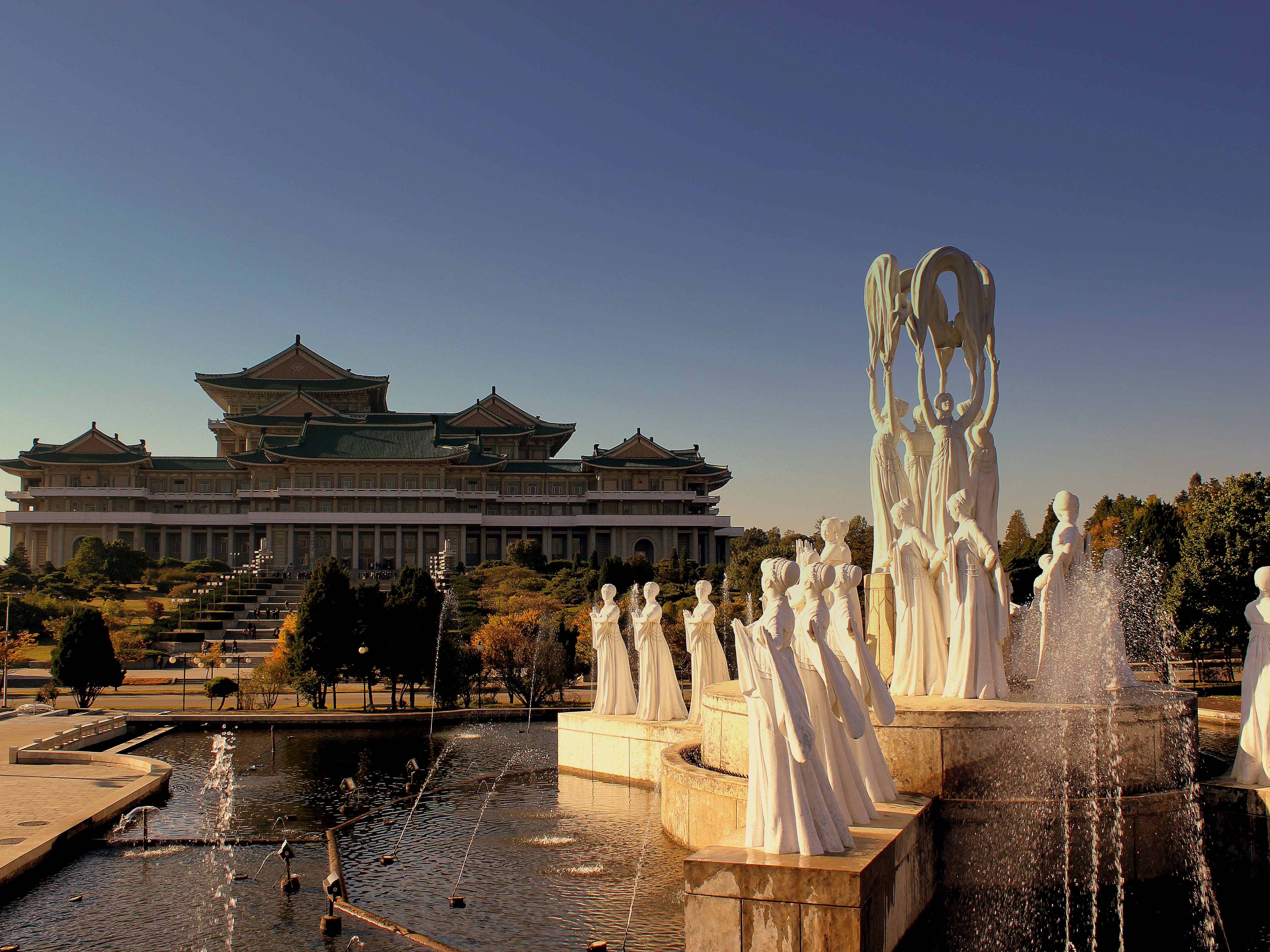 FOUNTAIN PARK PYONGYANG CITY DPR KOREA OCT 2012